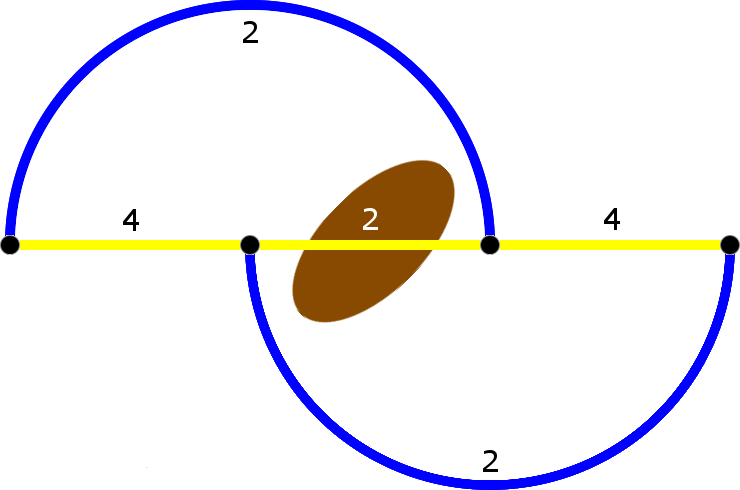 Illustration zum Braess-Paradoxon